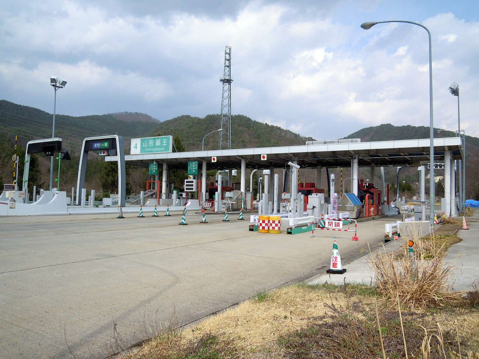 山形県山形市にある山形自動車道の山形蔵王インターチェンジ料金所を一般道側から